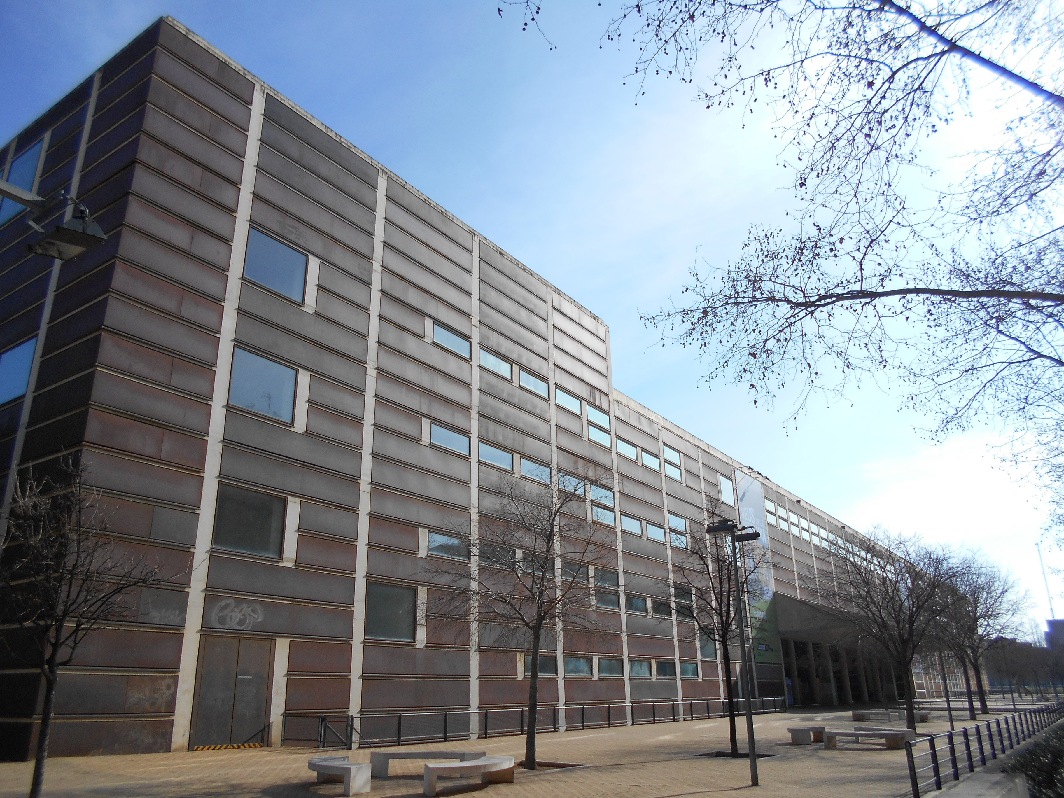 Auditorio de Barcelona.